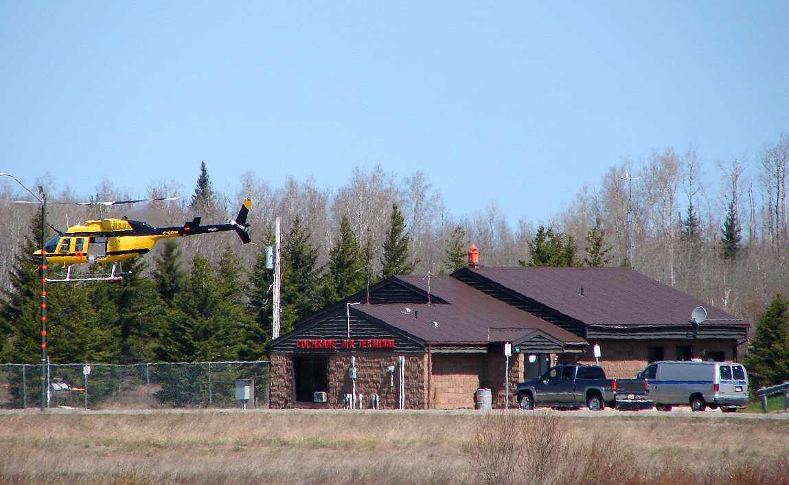 Cochrane Municipal Airport, Ontario, Canada